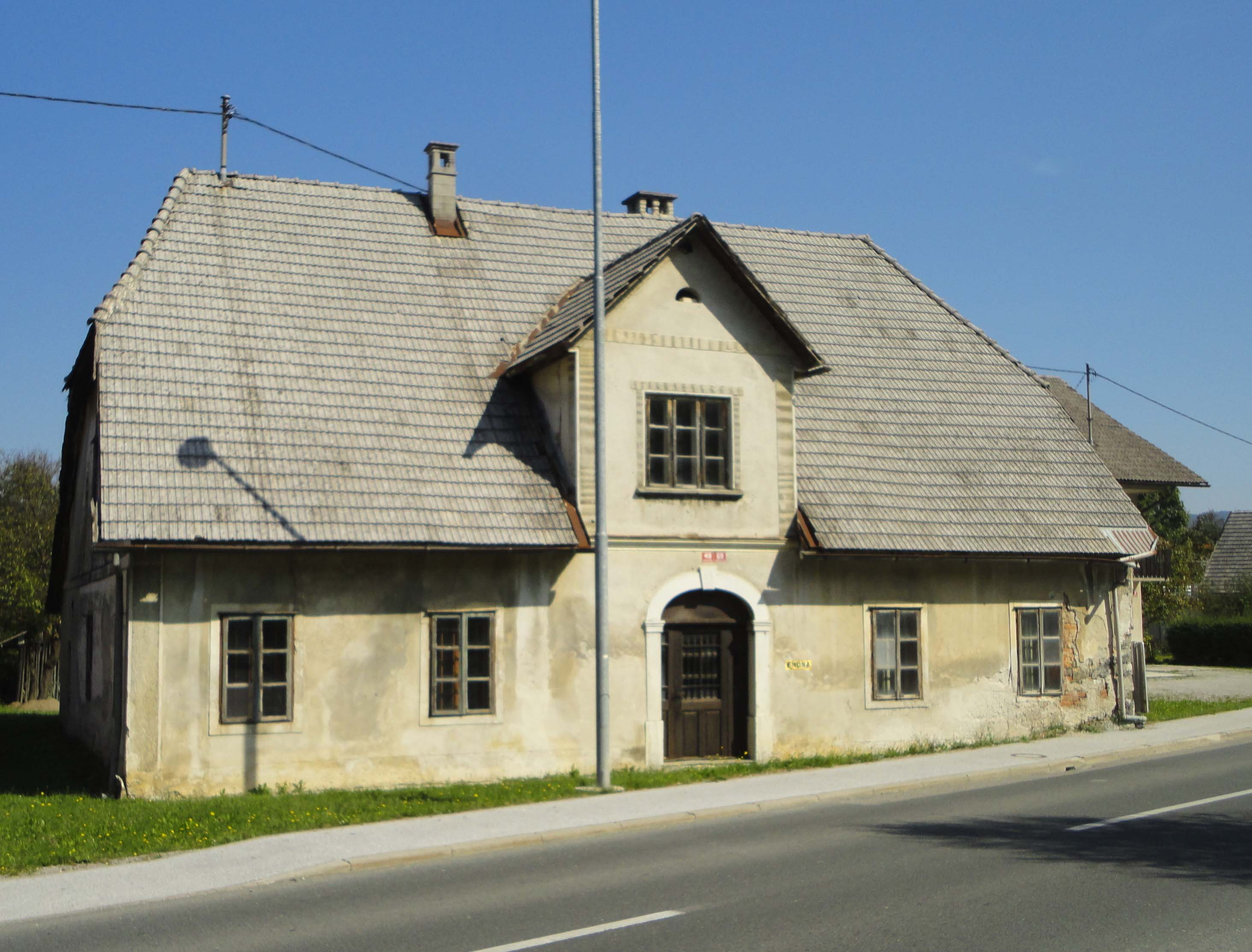 Dolga vas pri Kočevju: kočevarska hiša z napisom "EMONA"